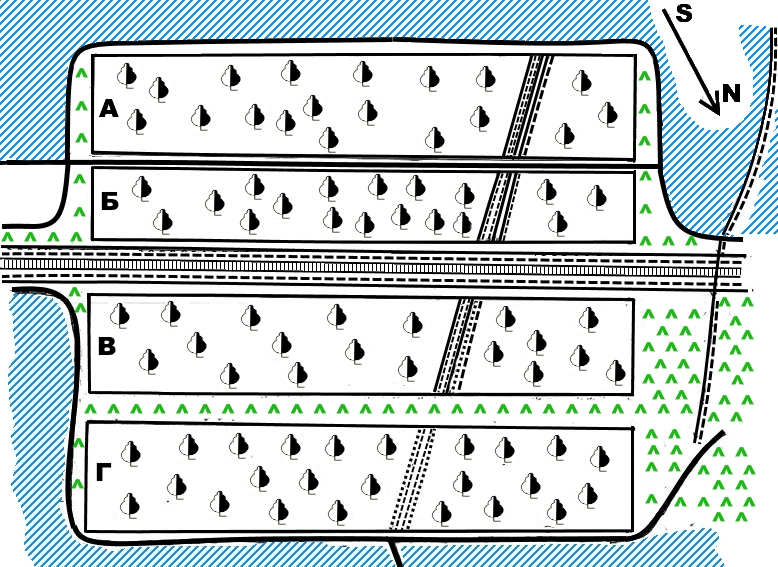 Скіфський курган в Нагірянці Чортківського району Тернопільської області.